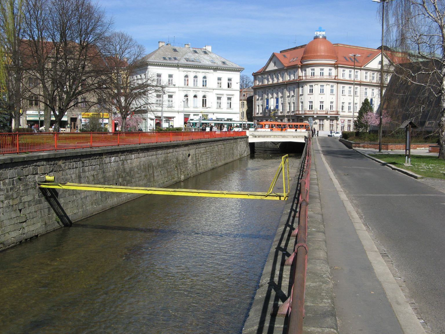 Lužická Nisa, Liberec, Czech Republic